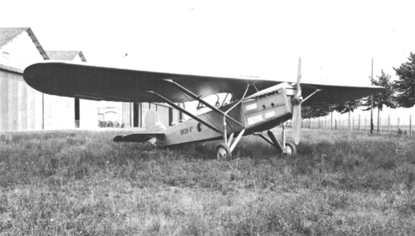 Breda. Ba.16